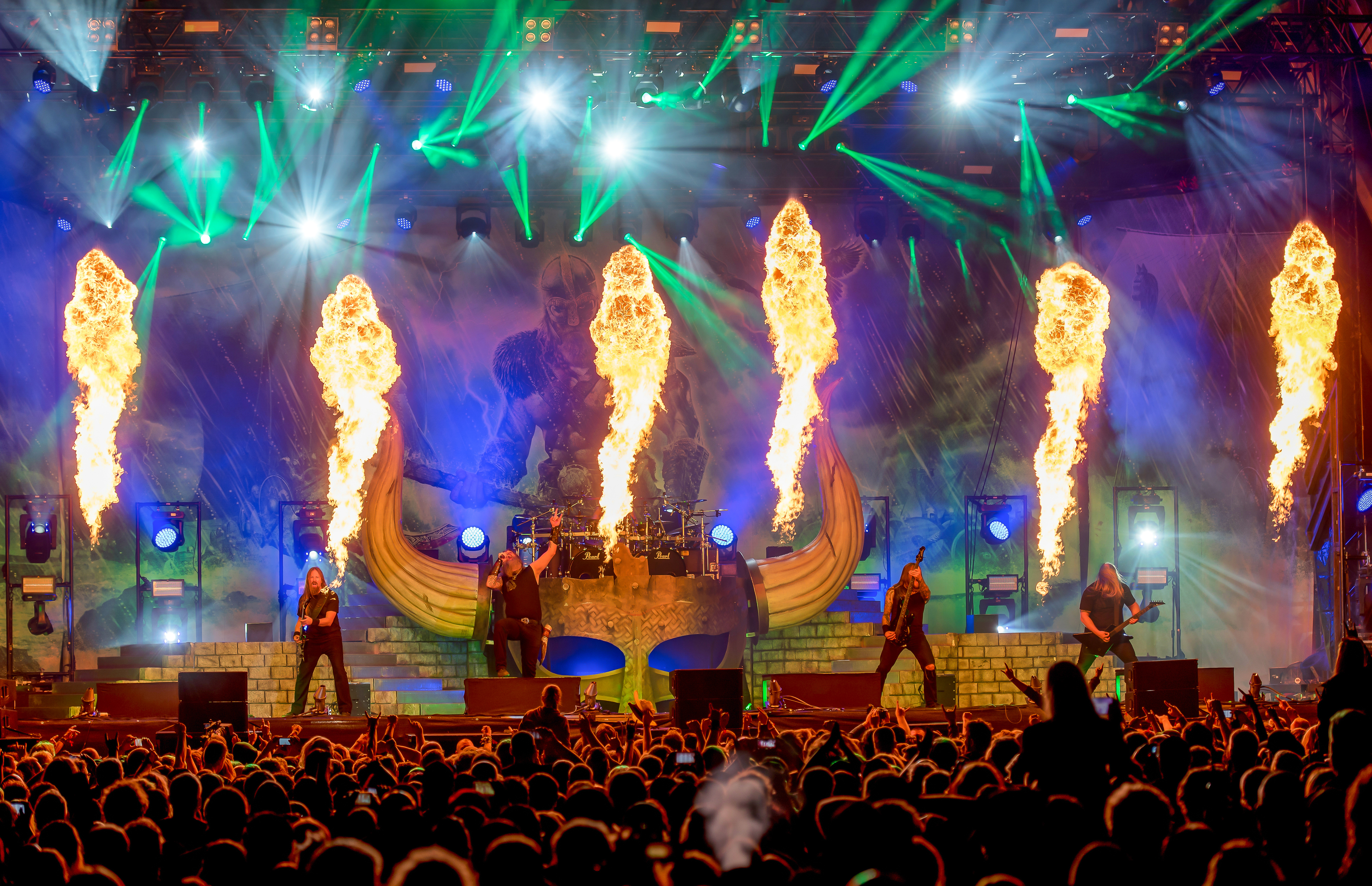 Amon Amarth beim Reload Festival 2017